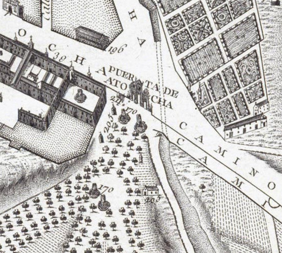 Plan geométrico e histórico de la Villa de Madrid y sus contornos. Nicolas Chalmandrier, 1761. Detalle de la Puerta de Atocha, y las cuatro fuentes de las Delicias.